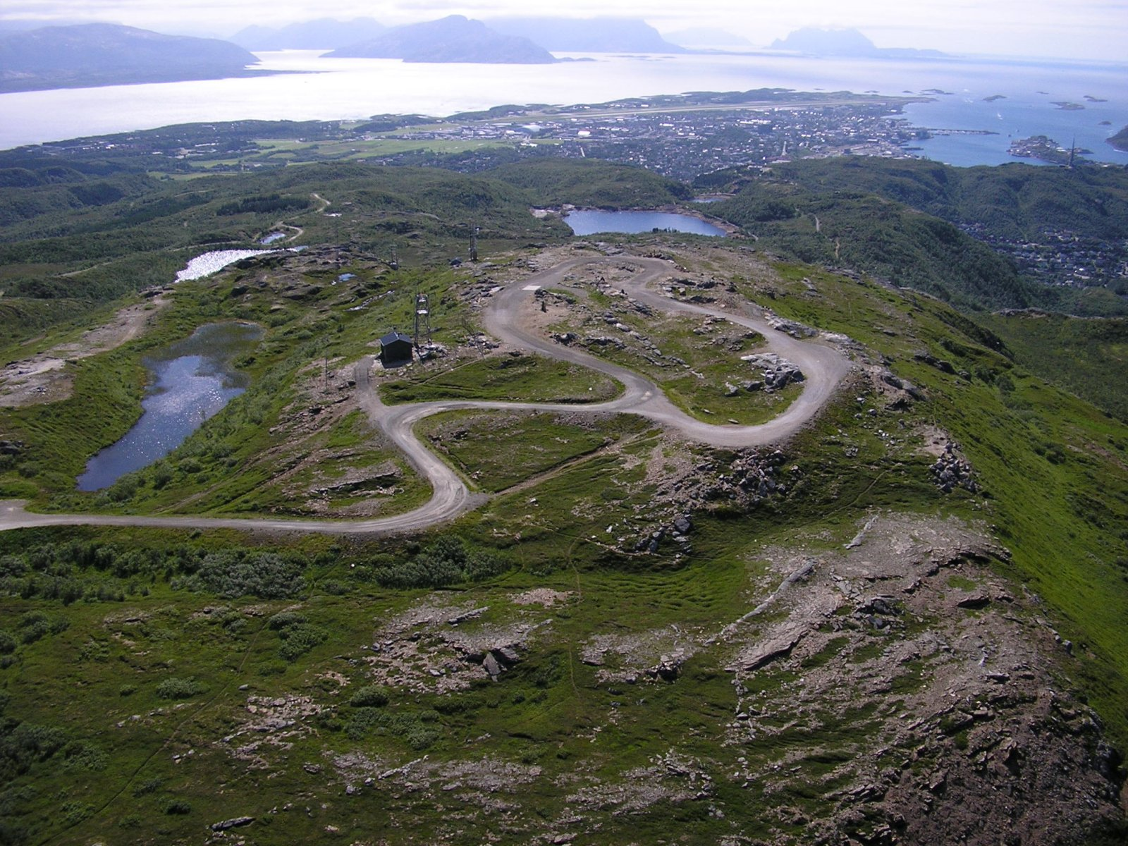 Utsikt over Keiservarden og Bodø fra paraglider.